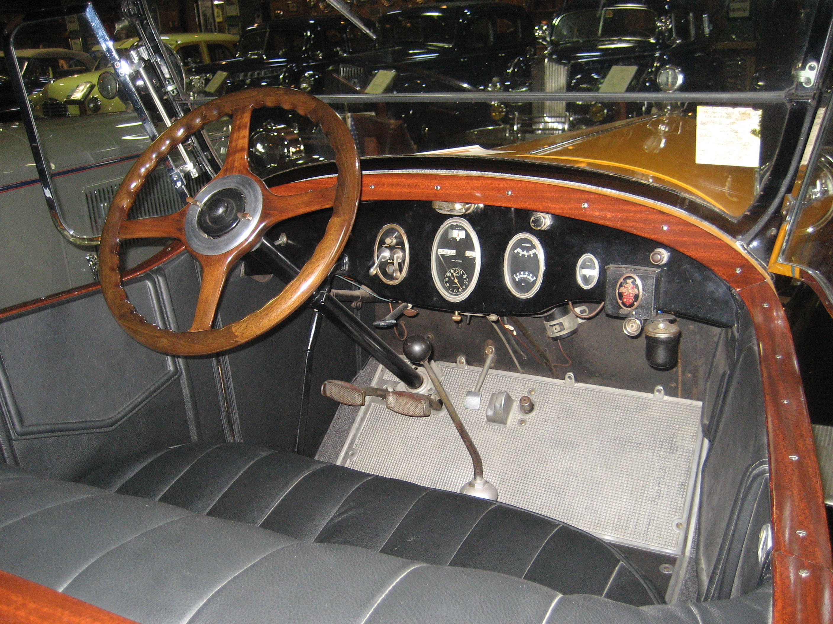 1926 Packard Touring on display at Fort Lauderdale Antique Car Museum.